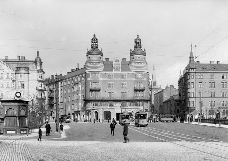 Carlbergska huset, Barnhusgatan 18 även kallad LO-borgen. Fackförbundet LO (Landsorganisationen i Sverige) köpte huset 1926, och har haft sitt kansli i huset sedan dess. Huset kallas därför även för LO-borgen eller LO-huset.